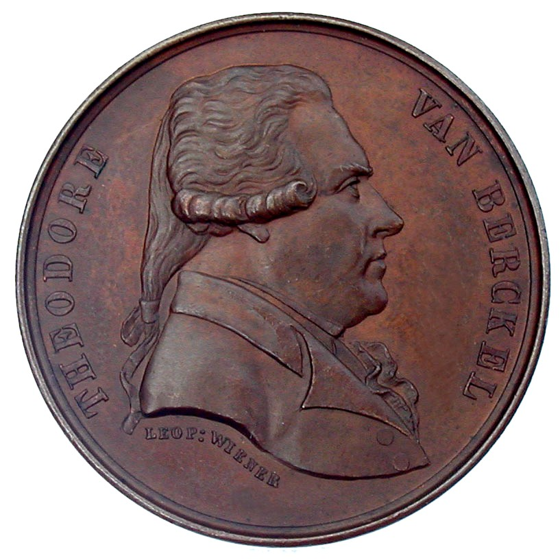 Portrait of Theodoor Victor van Berckel (1739-1808) on a medal made by Léopold Wiener - July 1871